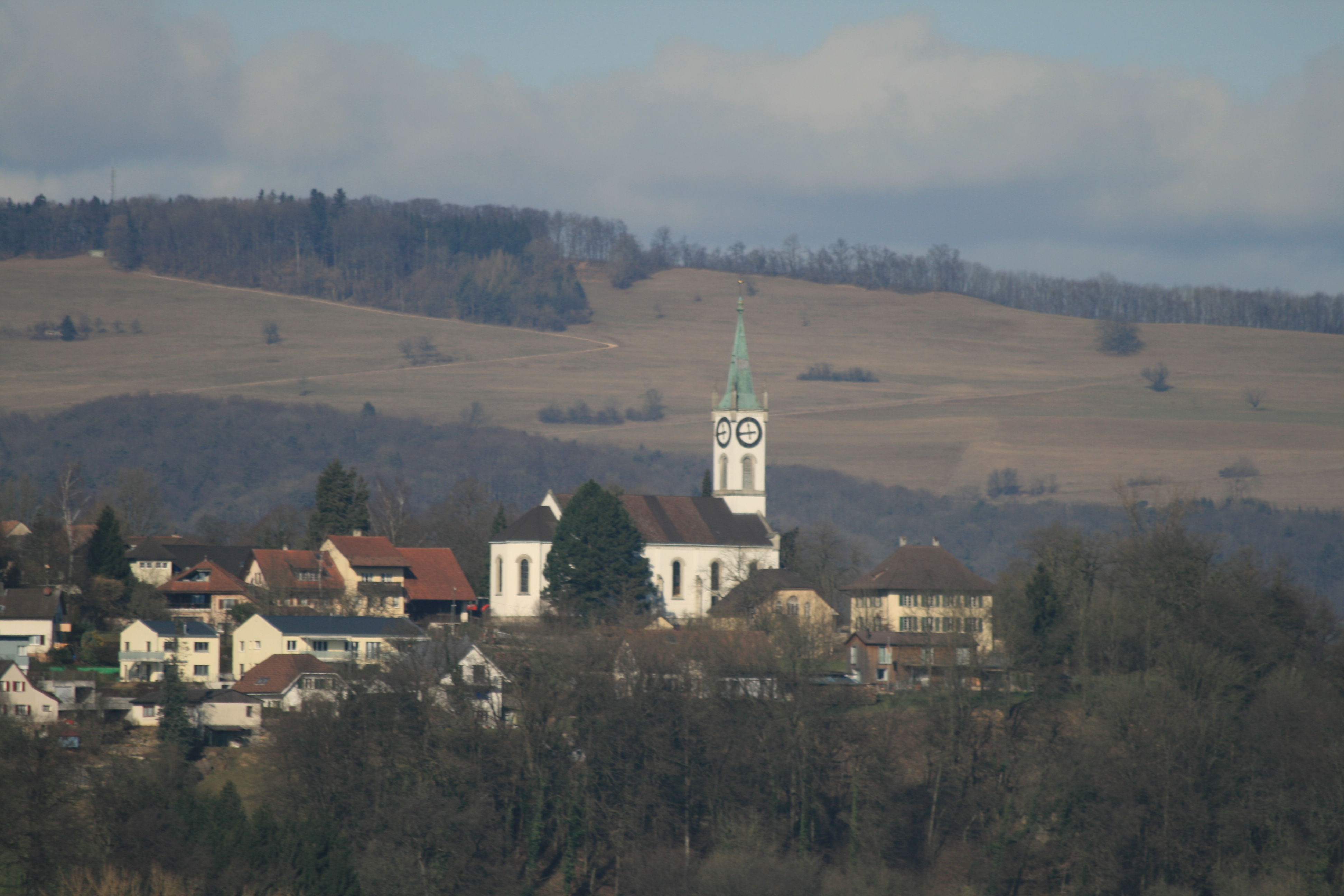 Rein (Gem. Rüfenach) mit der Kirche und dem Pfarrhaus